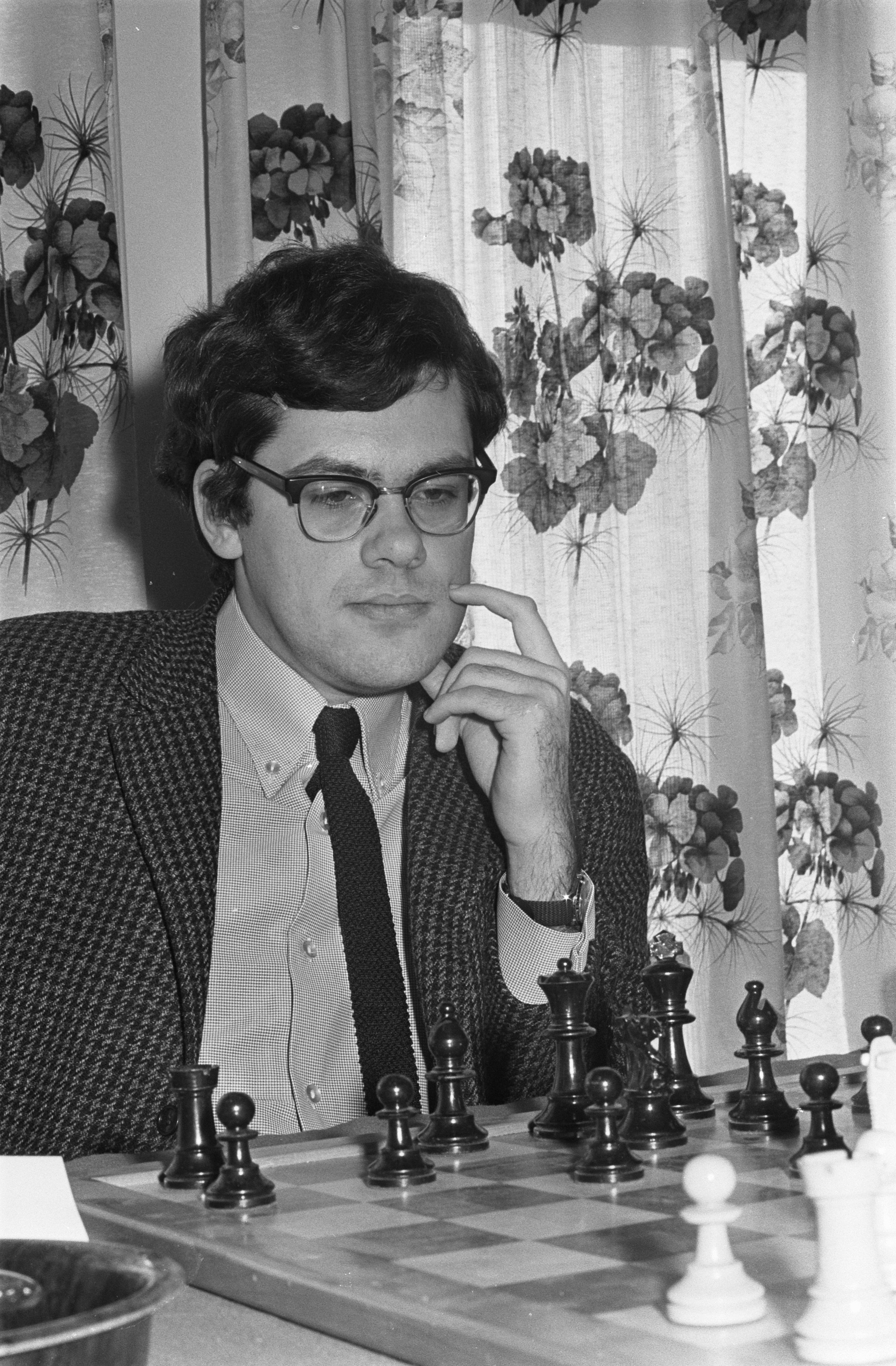 Hoogovenschaaktoernooi 1968, Hans Ree.